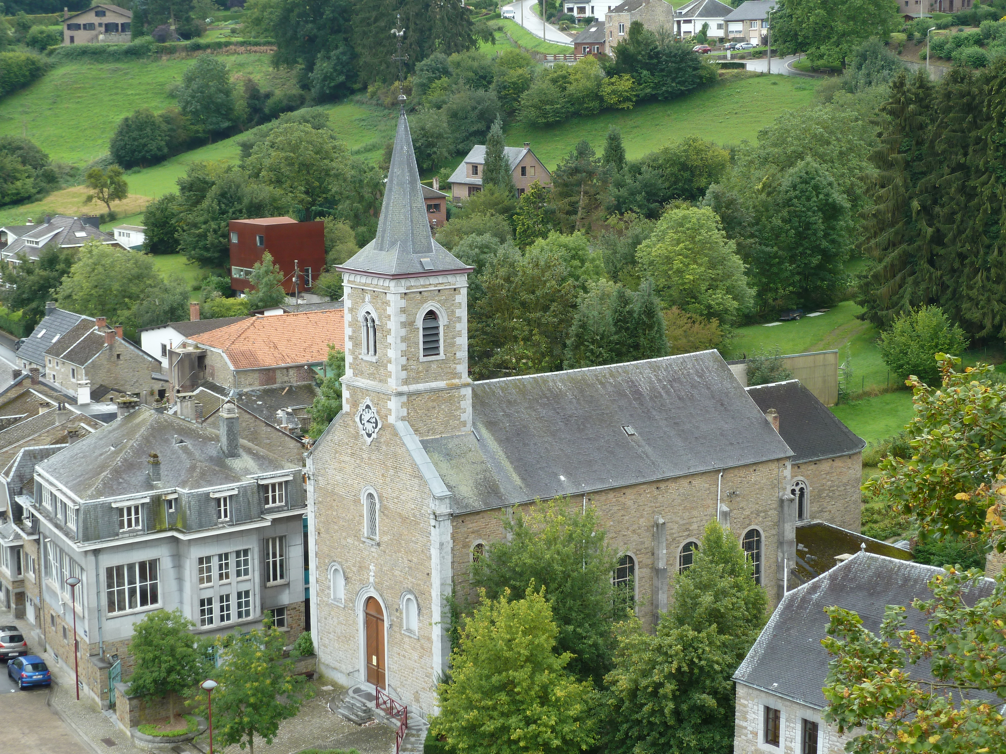 église Saint-Martin, Comblain-au-Pont, Belgique